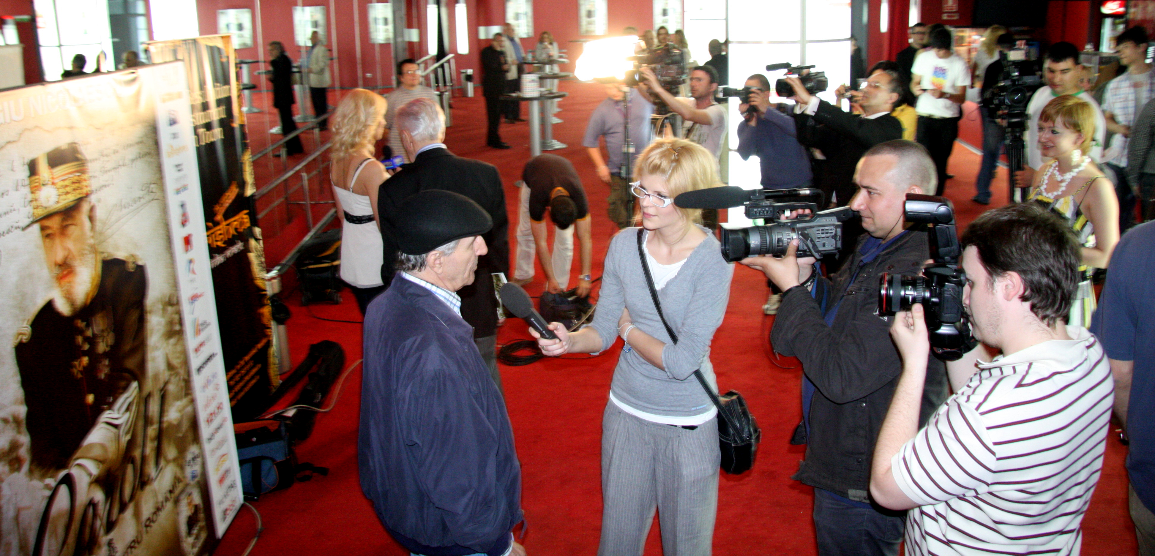 Gheorghe Dinica la premiera filmului Carol I